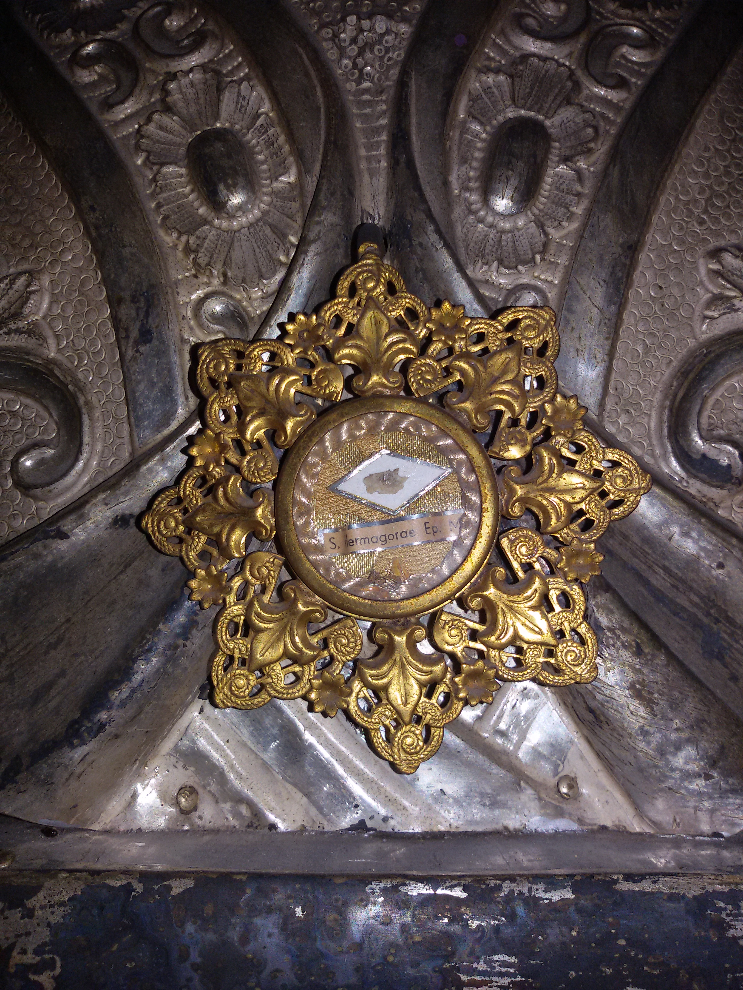 Santa Cristina Vergine e Martire del Tiverone